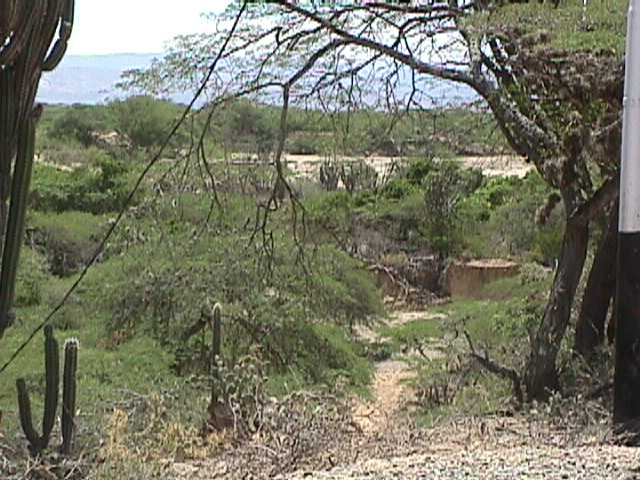 Parque nacional Cerro Saroche, estado Lara - Venezuela (1999)